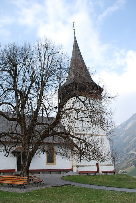 Eglise de St. Stephan i. Simmental (Saint-Etienne)